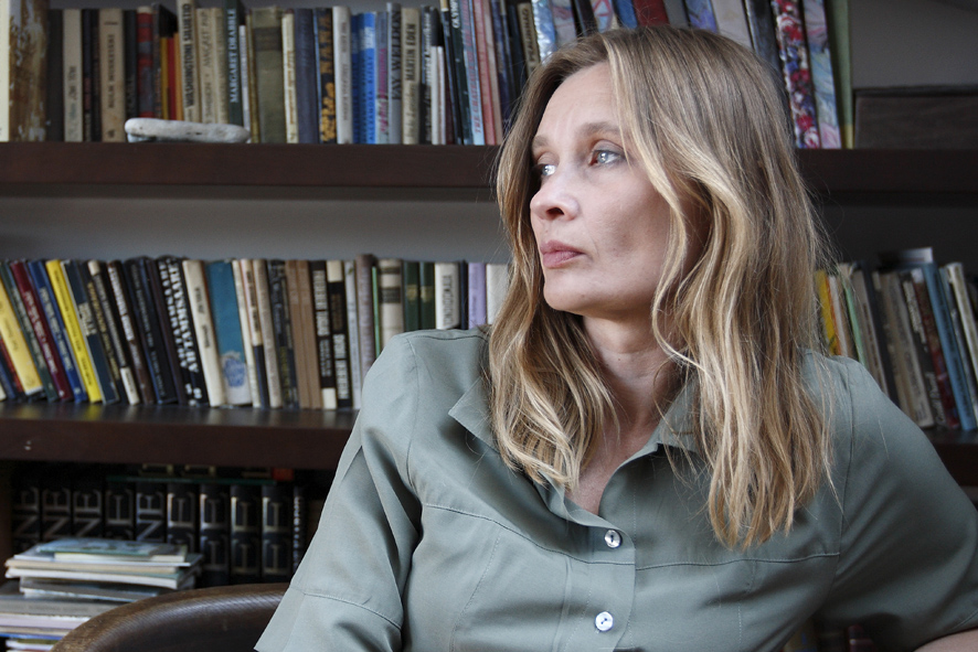 Margit Mutso